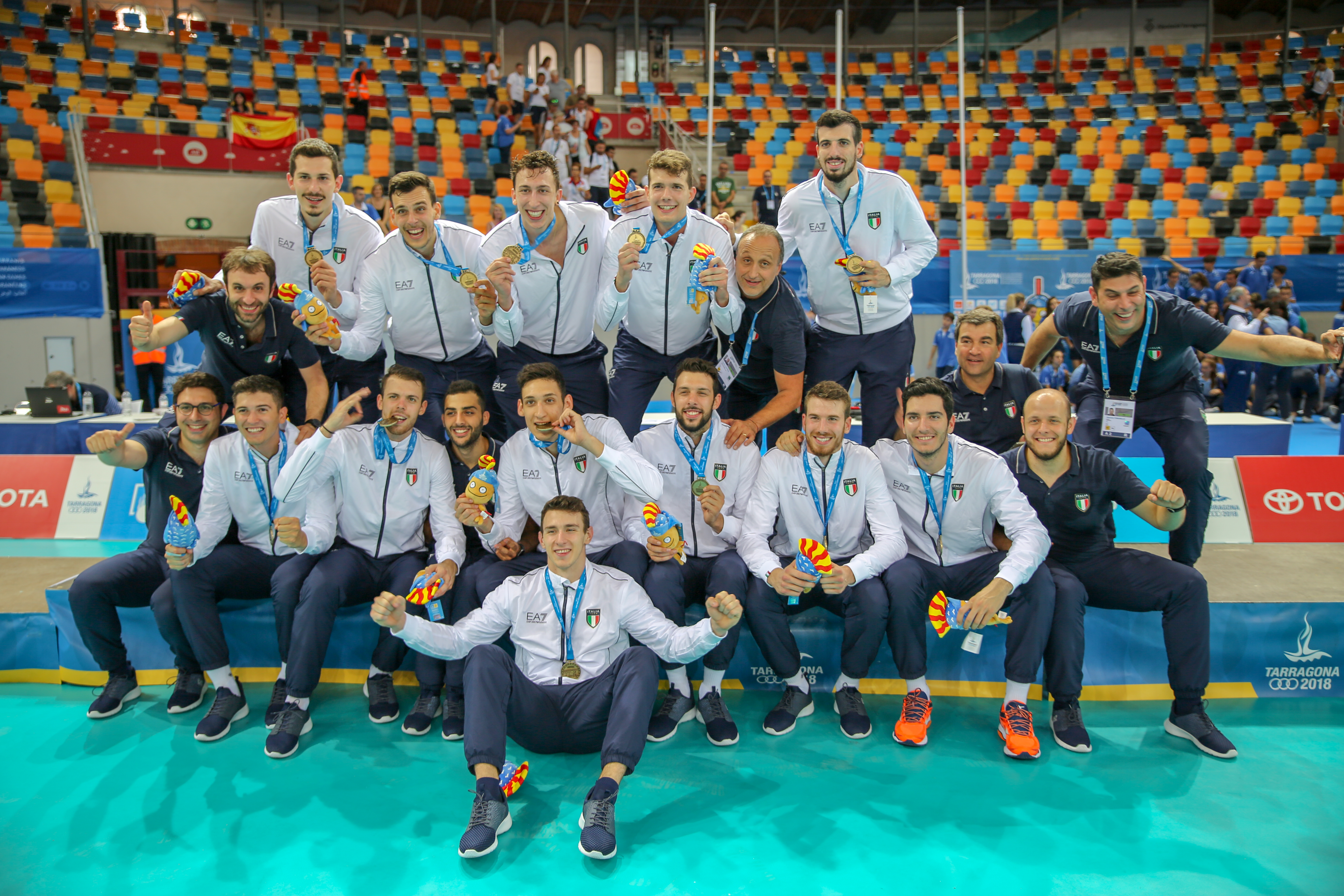 Italia medallas - Juegos del Mediterráneo 2018